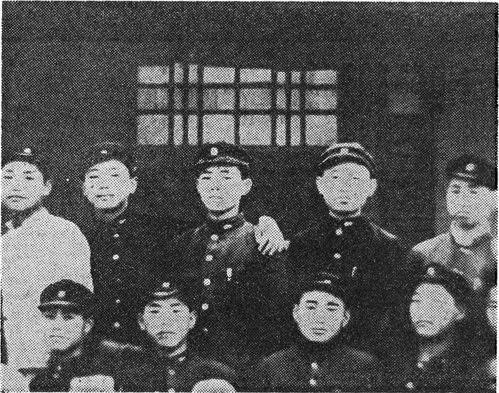 전두환의 대구북공업고등학교 재학 시절